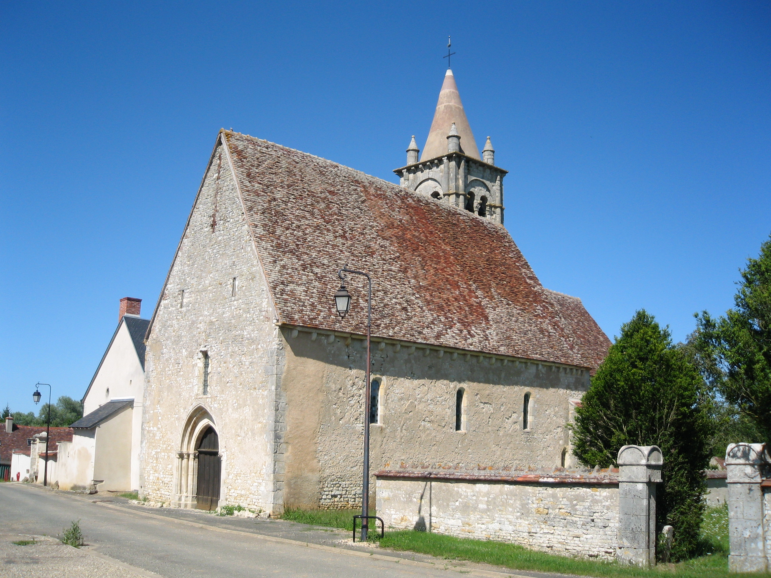 Eglise saint Laurent, XII°,Primelles.